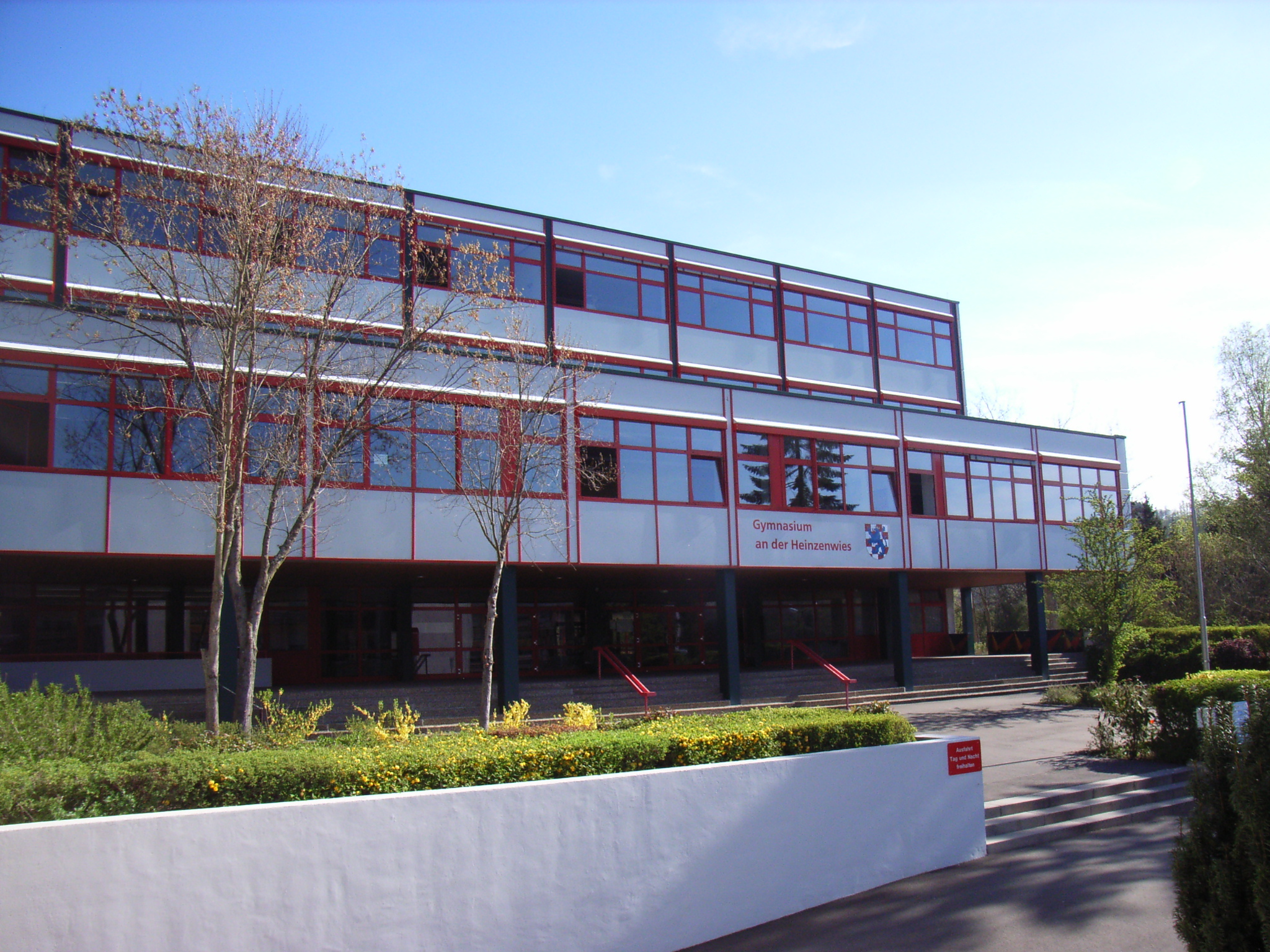 front of Gymnasium an der Heinzenwies, Idar-Oberstein, Germany